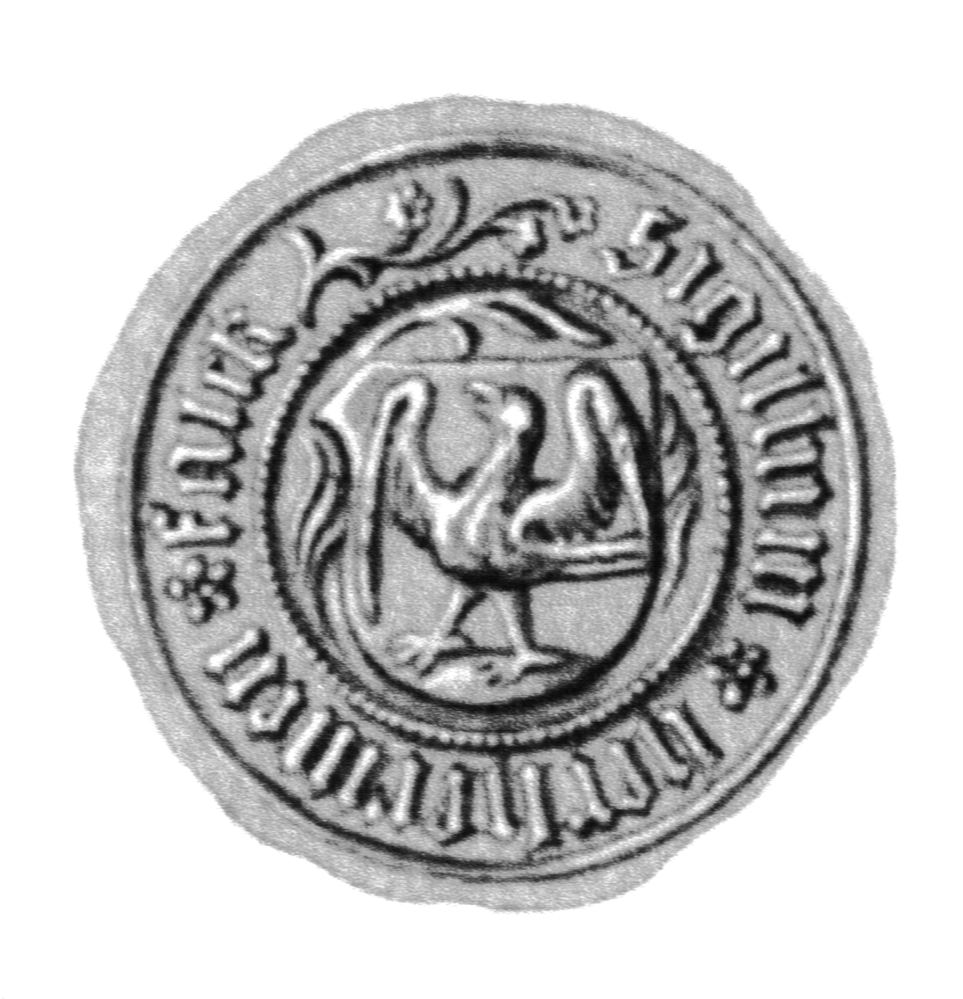 Siegel des Ratsmannes Herman Falke. Das Siegel stammt aus der Zeit um 1529. Siehe Emil Ferdinand Fehling: Lübeckische Ratslinie, Nr. 598 (Hermann Falcke, BM).